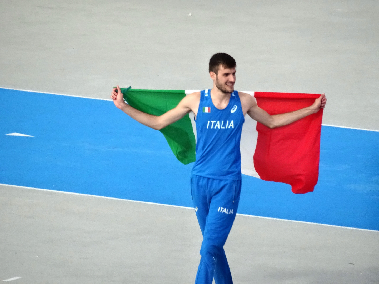 Młodzieżowe Mistrzostwa Europy w Lekkoatletyce U23 w Bydgoszczy 13-16 lipca 2017, finał skoku wzwyż mężczyzn